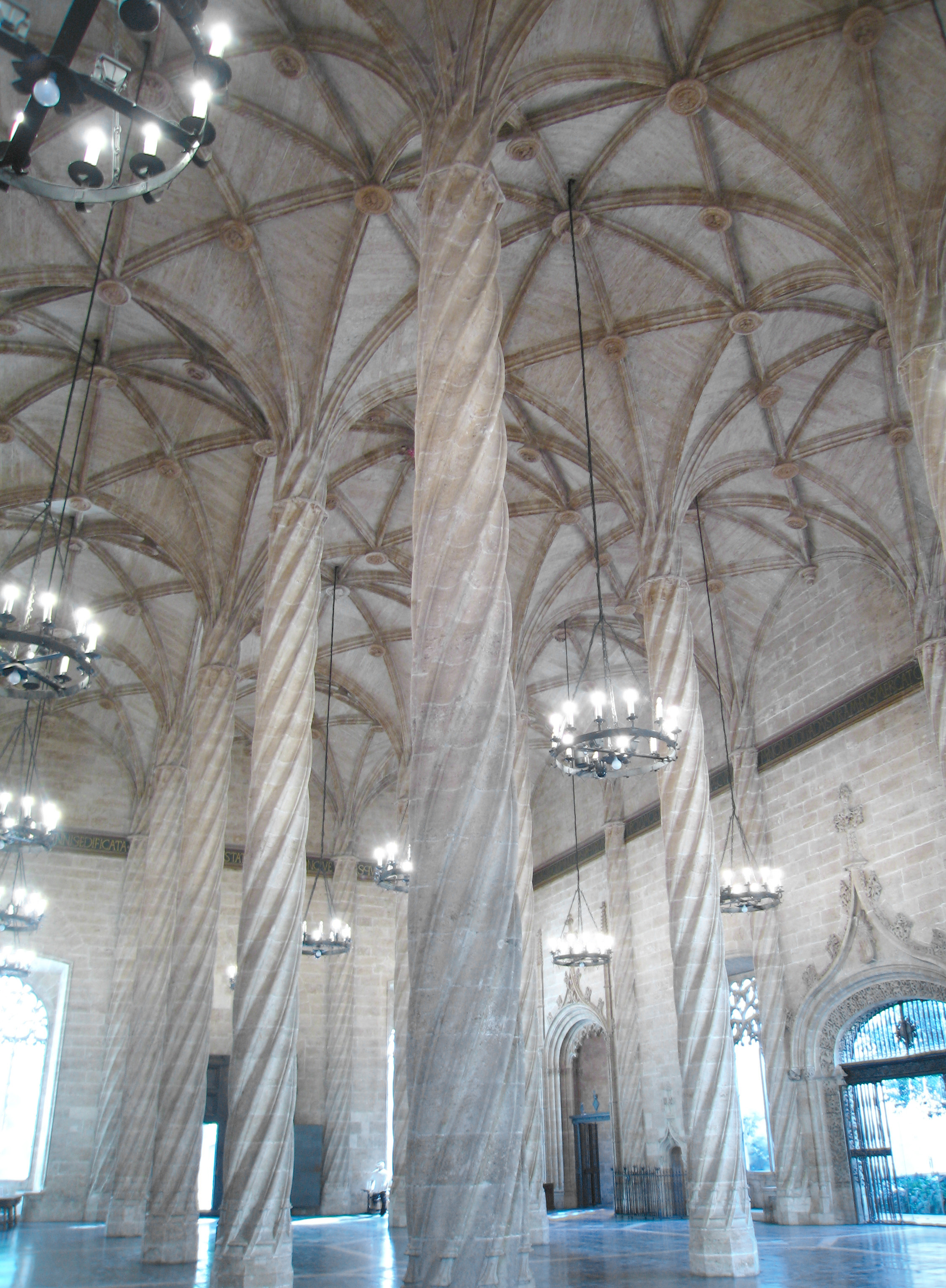 Sala de Contractació (Llotja de la Seda, València)